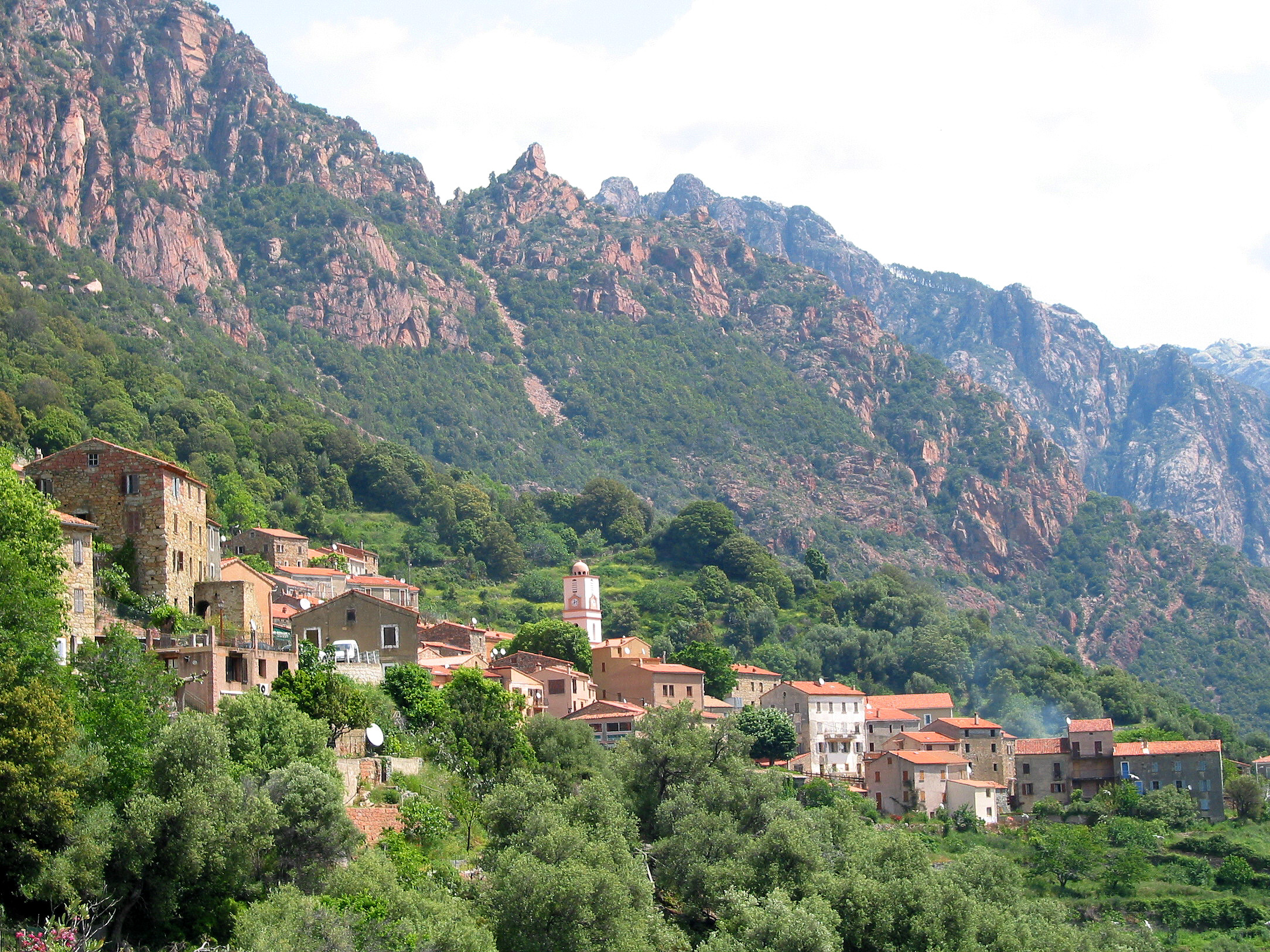 Ota, Corse-du-Sud - France , le village. Corsu: Ota Francia (Corsica suttana), u paese.